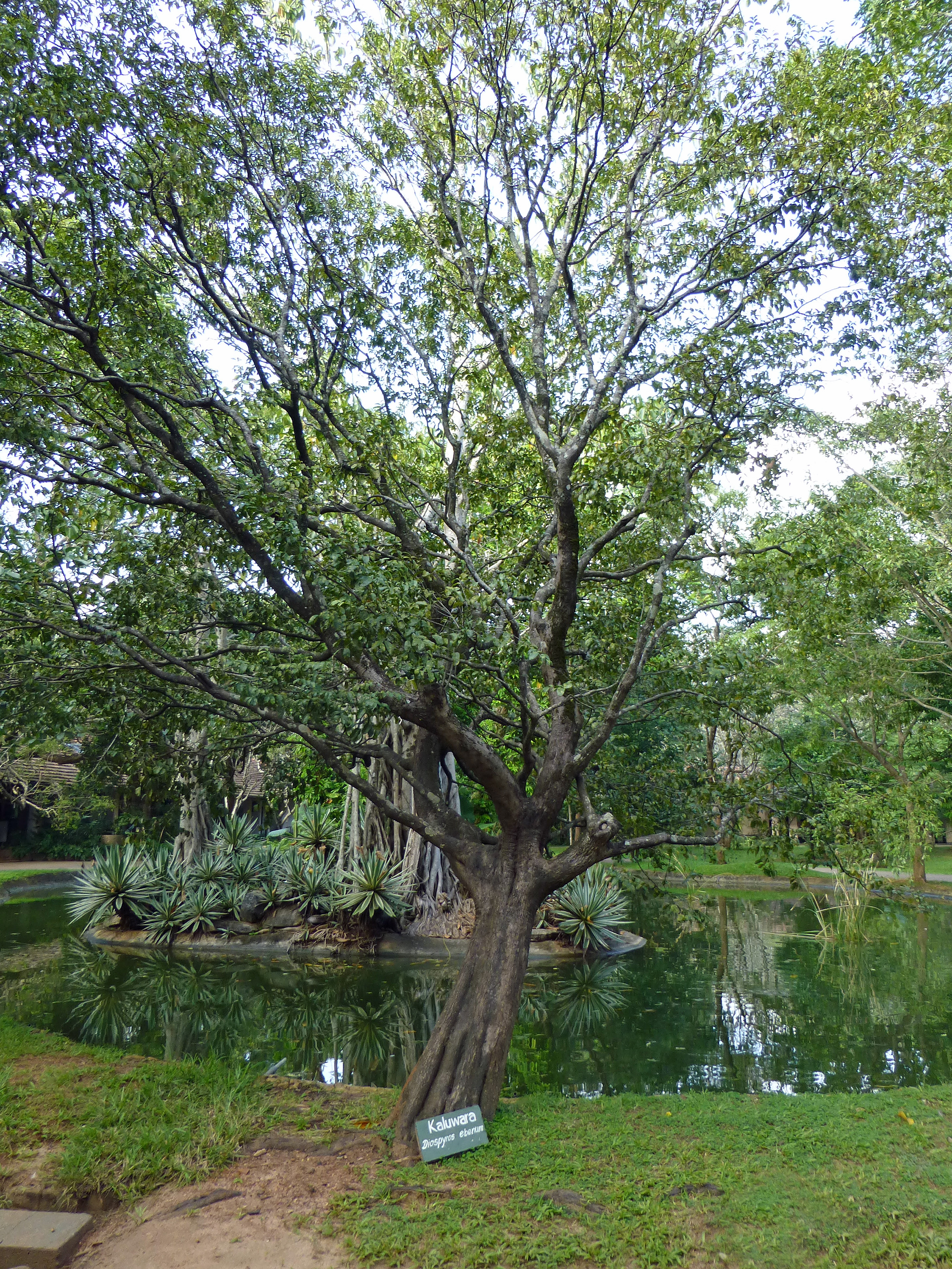 Kaluwara (Diospyros ebenum), Sigiriya Village, Sri Lanka